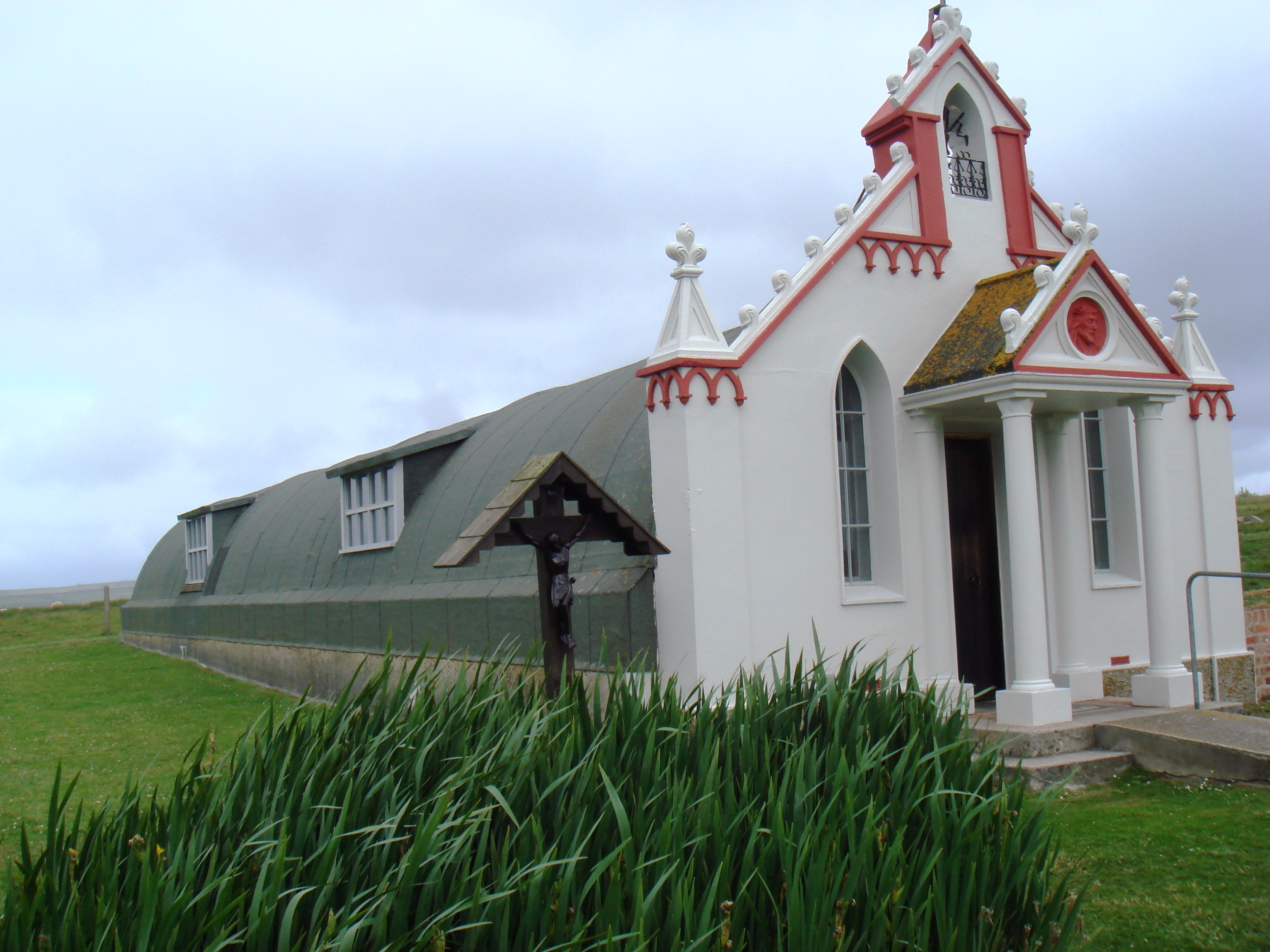 Capilla italiana, Islas Orcadas (Escocia)